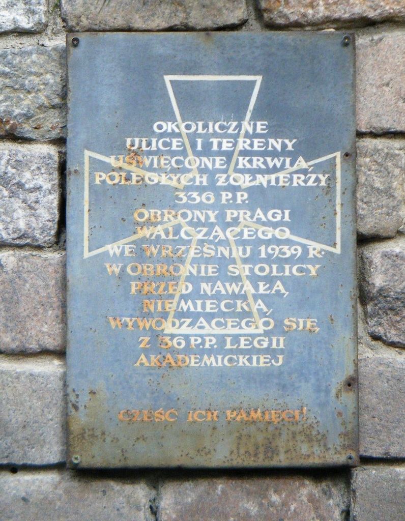 Tablica upamiętniająca żołnierzy 336 P.P. obrony Pragi, walczących z Niemcami we wrześniu 1939 roku. Warszawa, Saska Kępa, ul. Bajońska 6.